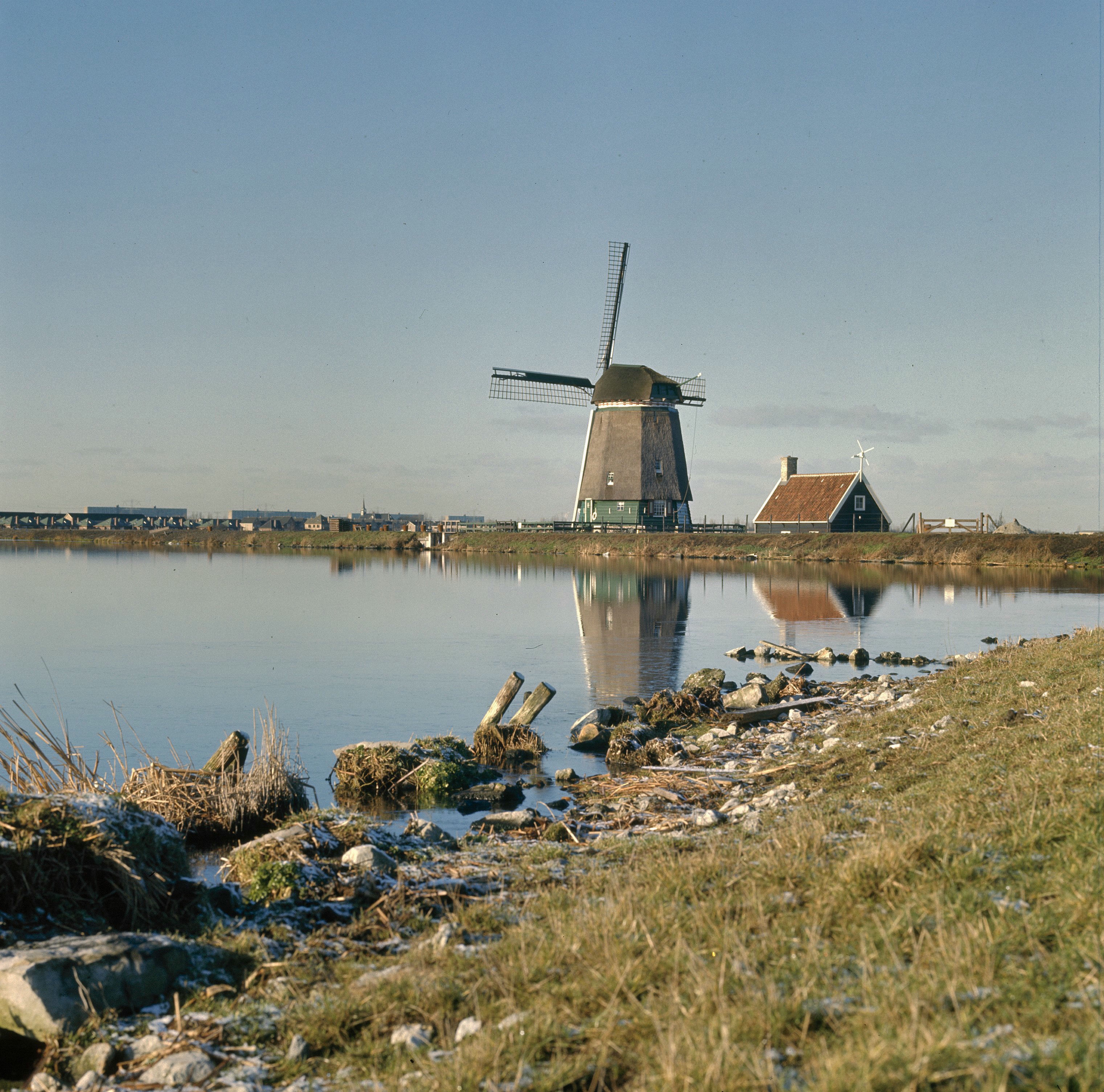 De Twiskemolen: De Twiskemolen aan de rand van de Twiskepolder van opzij gefotografeerd